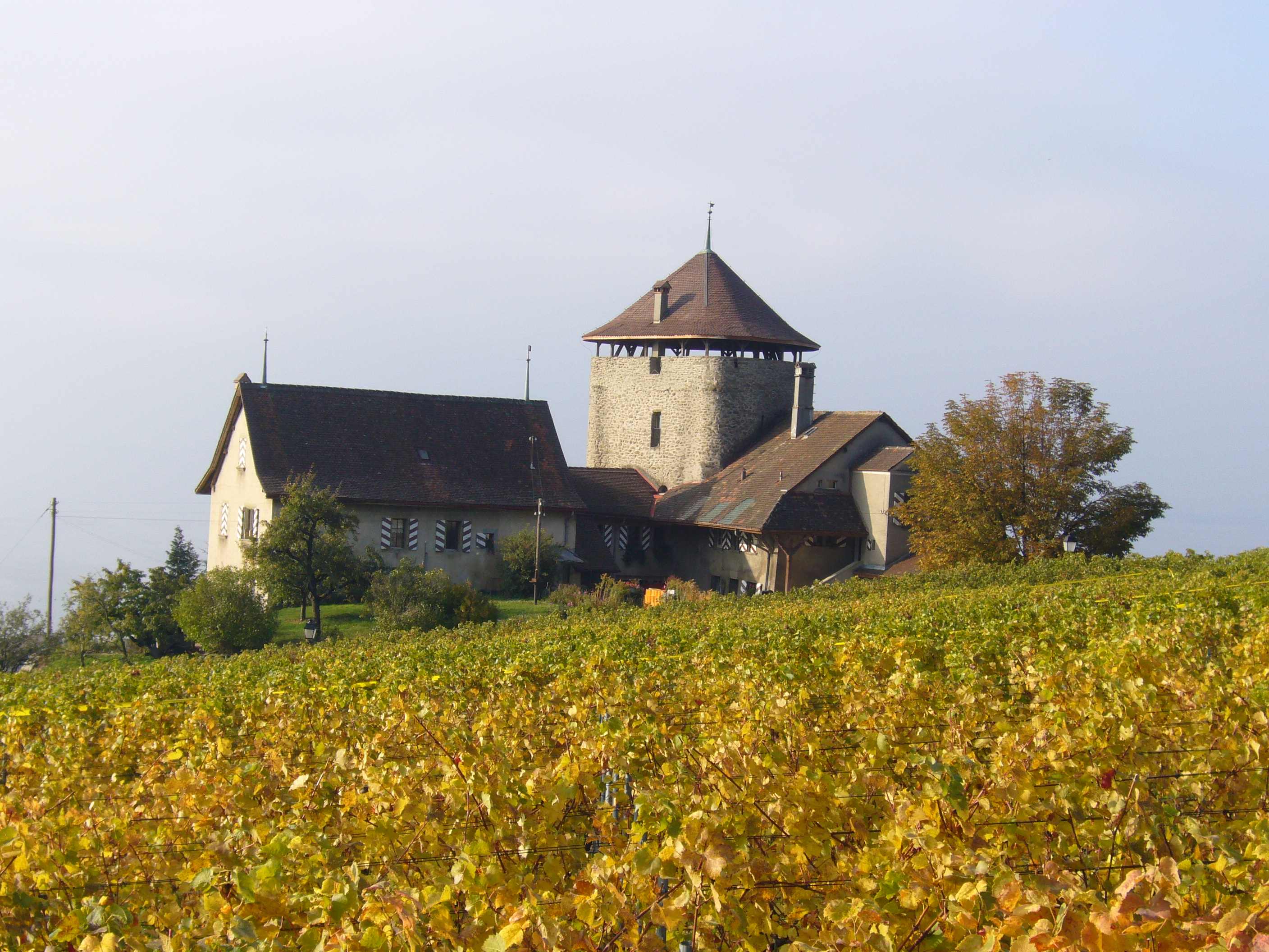 Bertholod-Turm in Lutry, Kanton Waadt